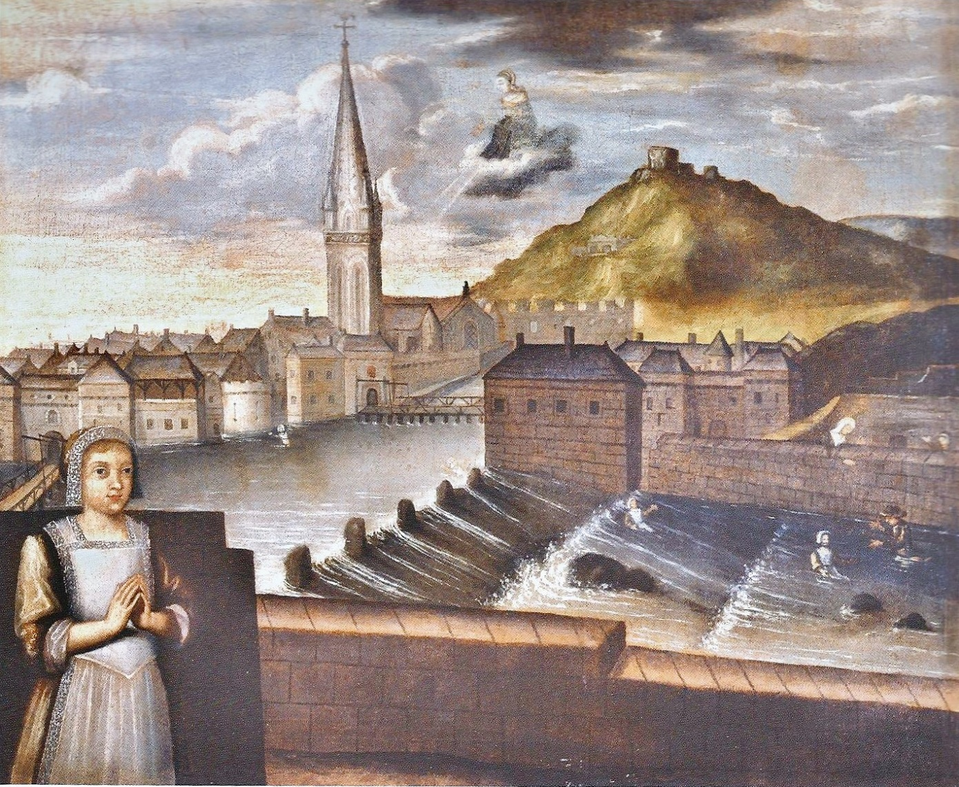 Ex-voto de Notre-Dame-du -Mur (anonyme, huile sur toile), datant du XVIe siècle, montrant la partie ouest de la ville intra-muros avec notamment le château à l'arrière-plan, , la collégiale de Notre-Dame-du-Mur et juste devant elle la porte du Bourret ; au premier plan la confluence du Queffleuth et du Jarlot, dont la chute alimentait les moulins du Duc. Ce tableau se trouvait dans l'église Saint-Mathieu de Morlaix avant d'être transféré au musée de Morlaix.